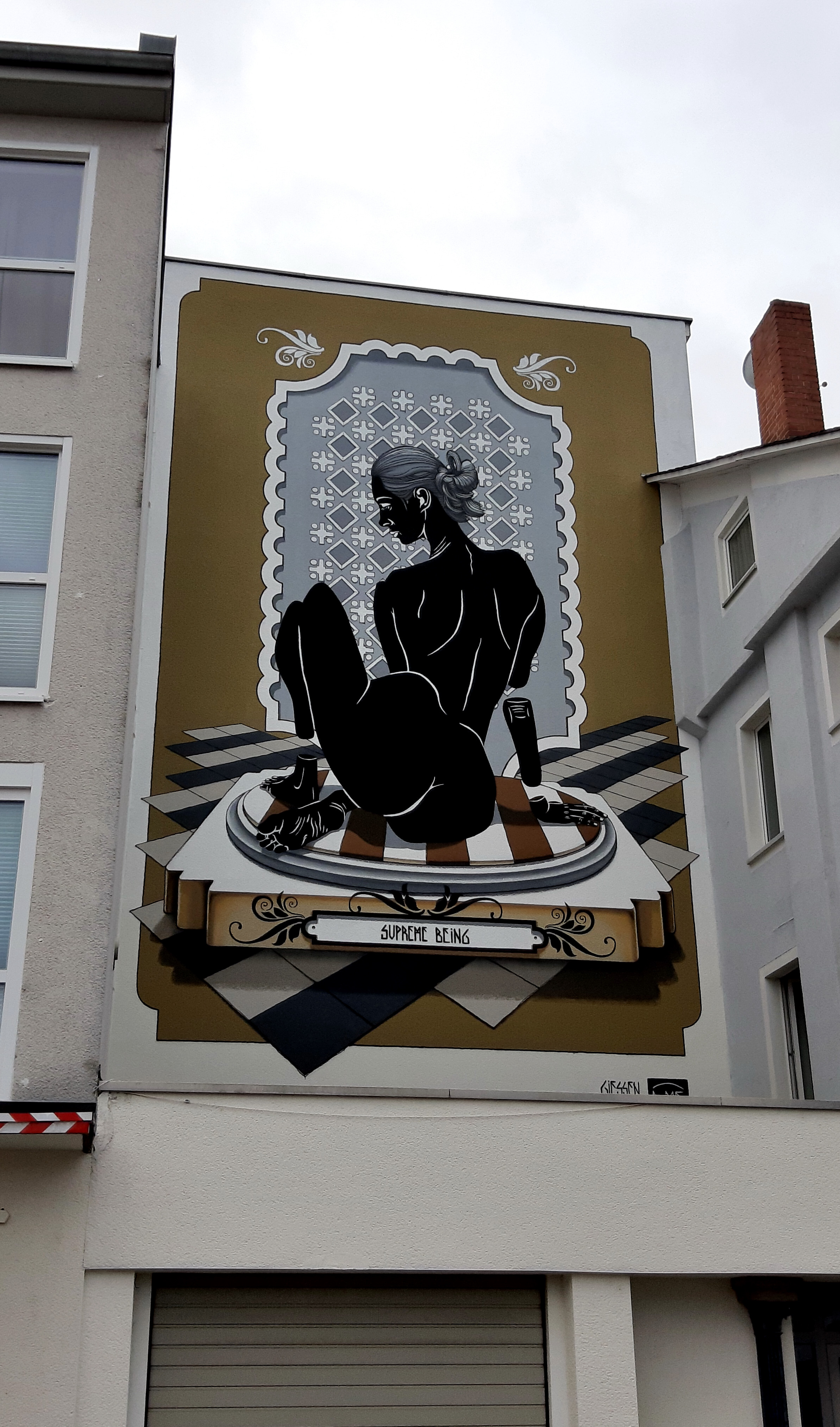 Streetart an einer Fassade in der Weidengasse